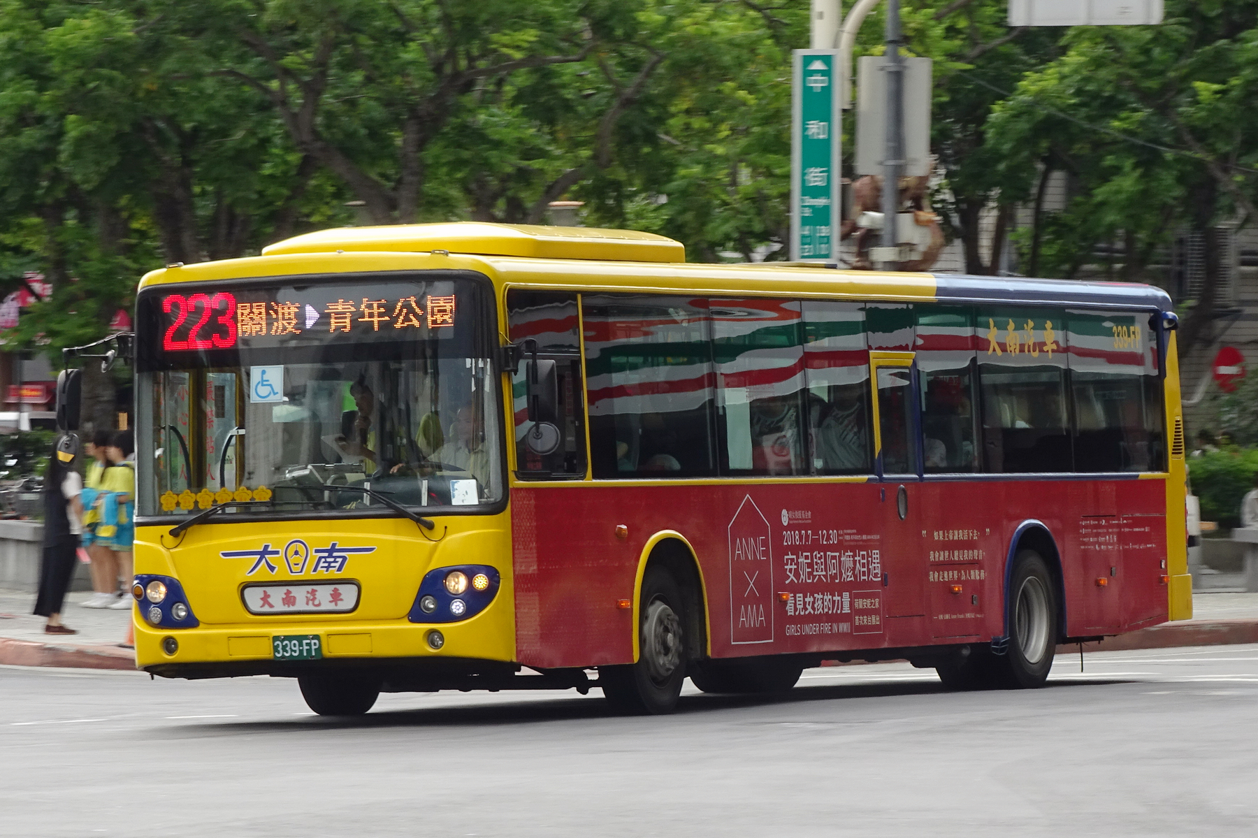 中文（台灣）: DAEWOO - BS120CN - 339-FP